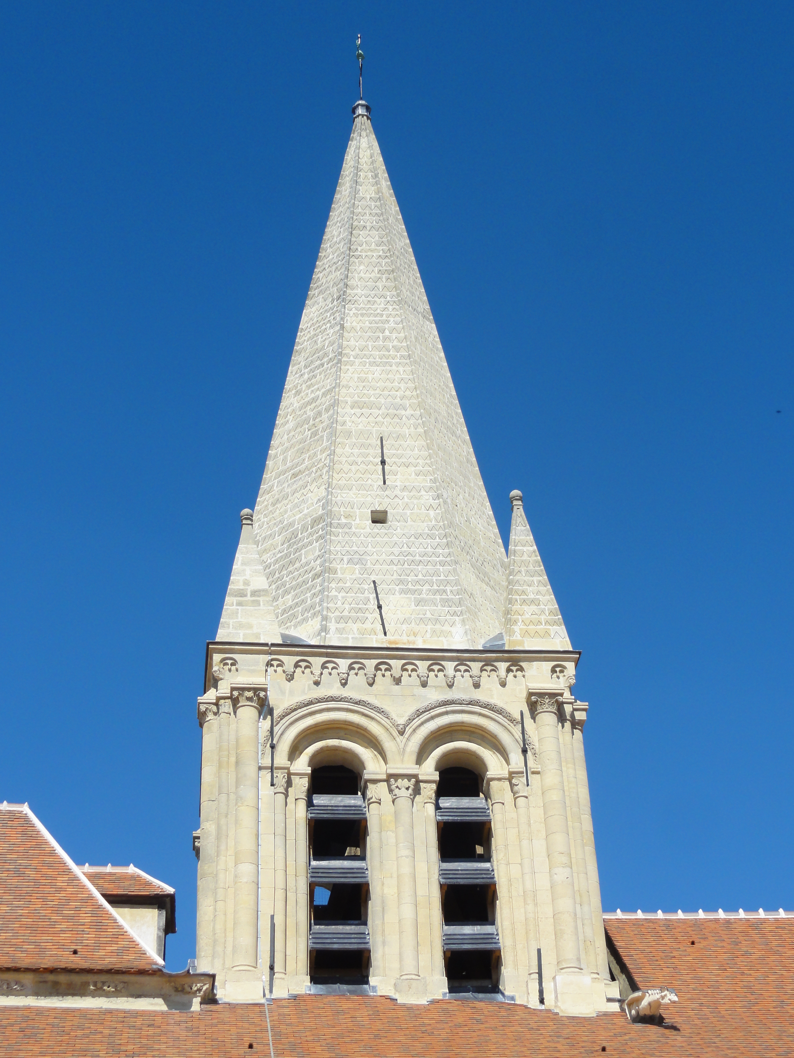 L'église Saint-Pierre-et-Saint-Paul de Sarcelles après sa restauration en 2014-2015 - voir titre.